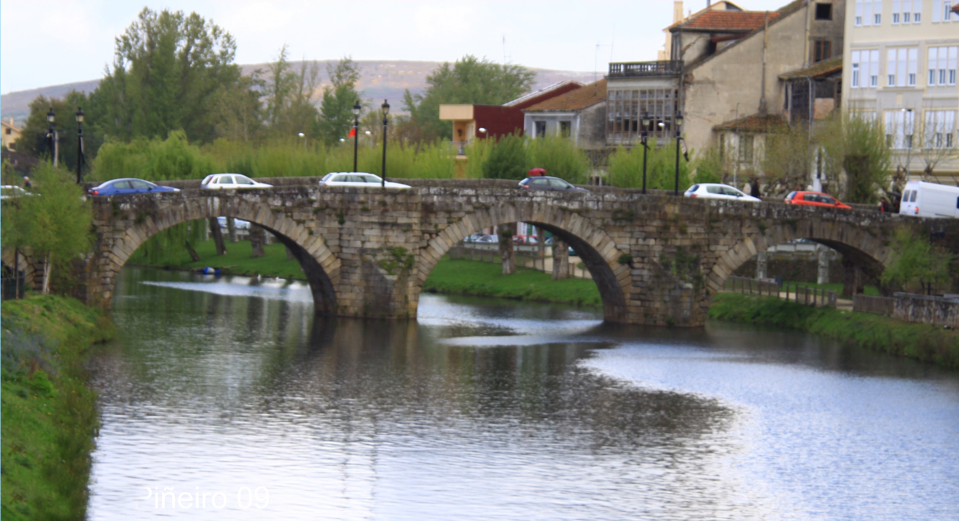 Ponte romana de Monforte de Lemos (provincia de Lugo, Galicia).